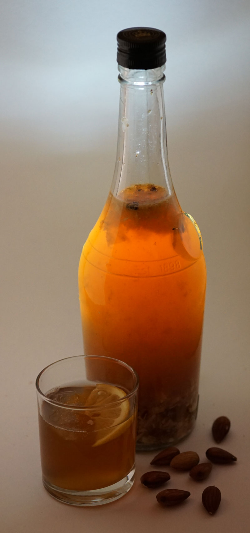 Фалернум